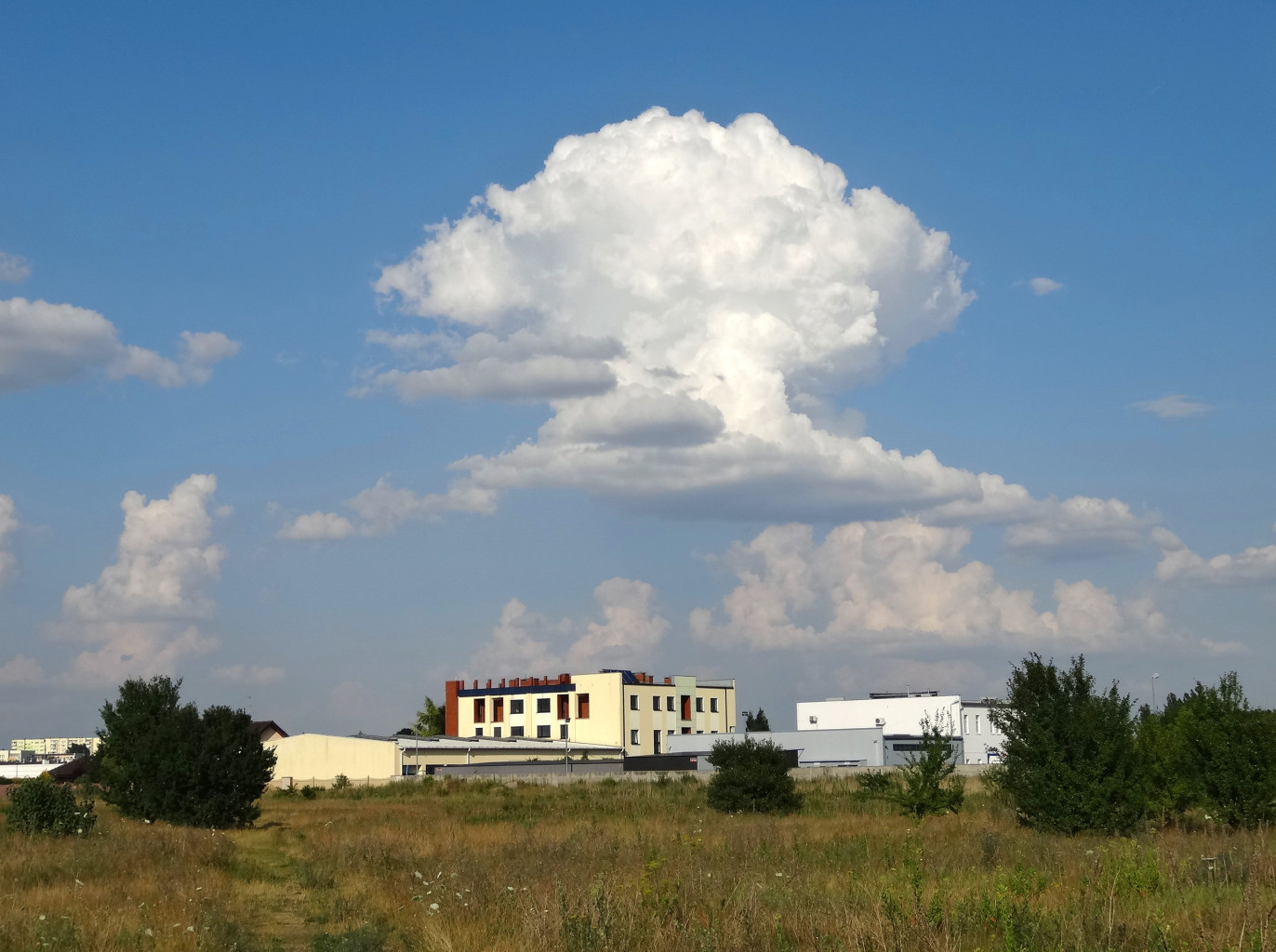 Zabudowa na osiedlu Biedaszkowo w Bydgoszczy